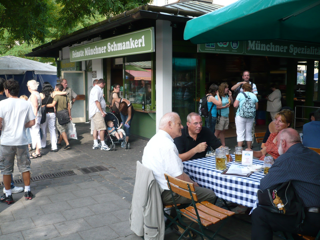 Viktualienmarkt in München